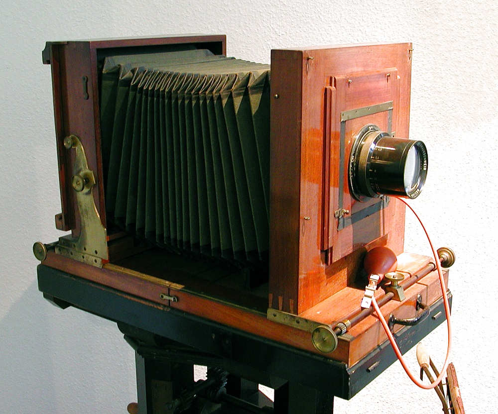 Großformat-Kamera